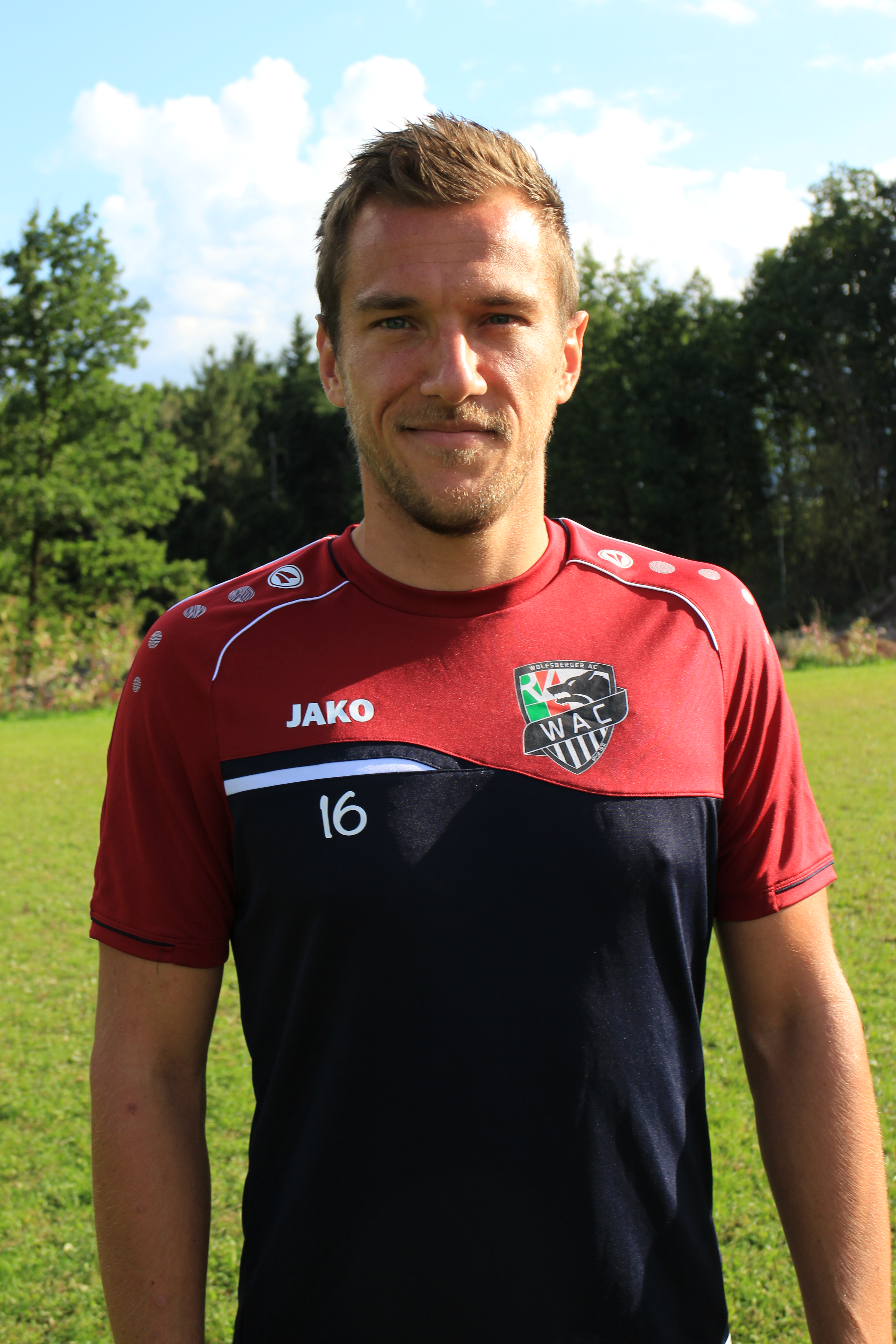 Mario Leitgeb (WAC)